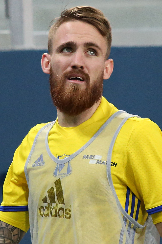 «Зенит» - «Ростов»